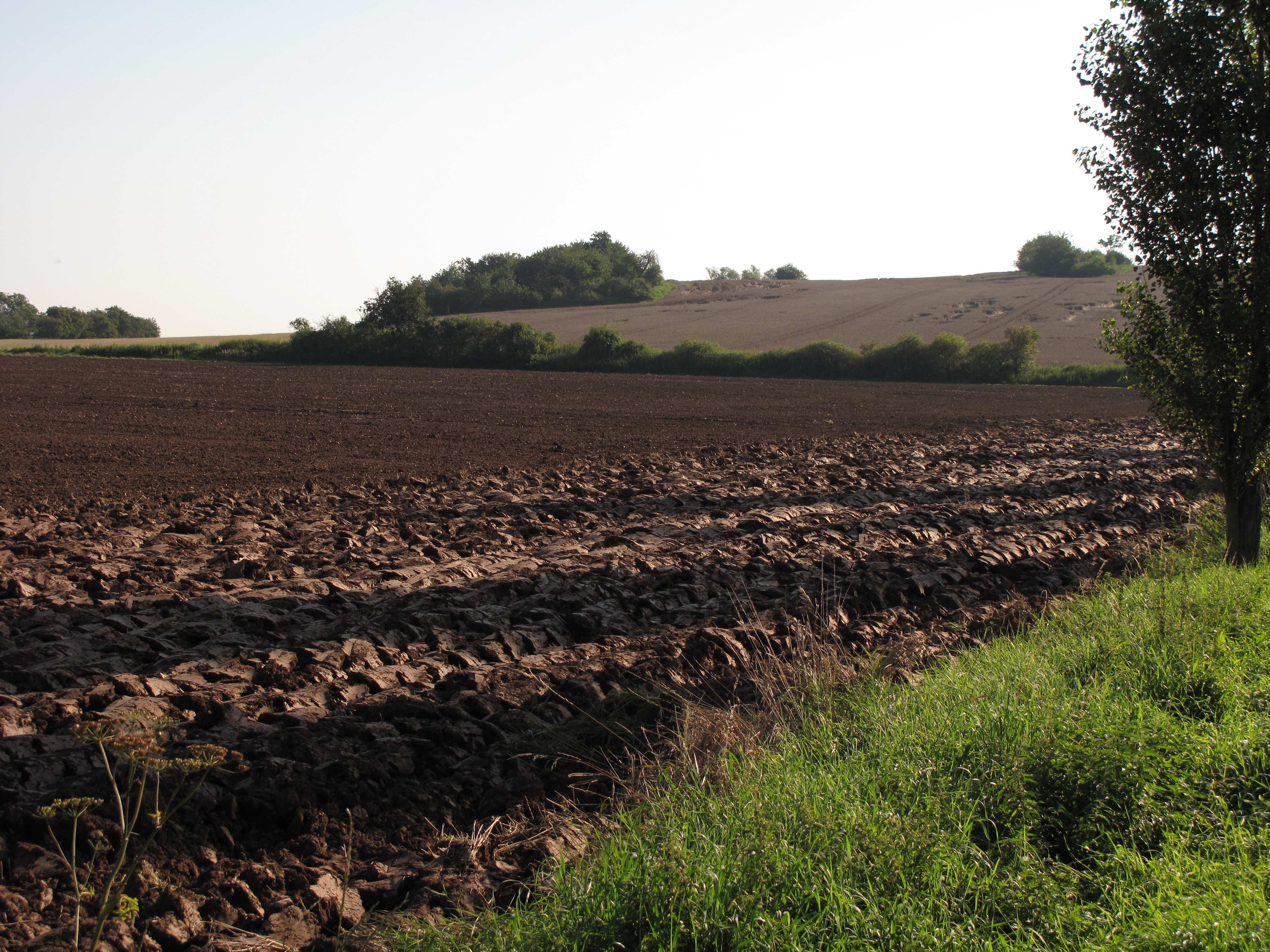 Ouvrať ze strany. Pole u Bylan (obec Chrášťany), okres Kolín, Česká republika.